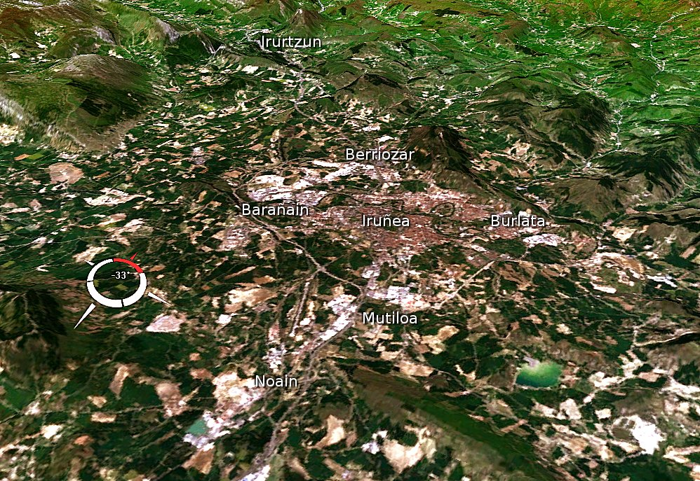 Iruñeko herriak eta erliebea